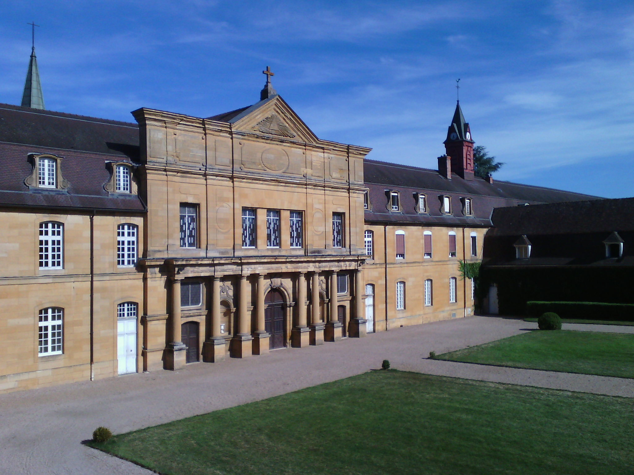 Façade de l'église de l'abbaye de Sept-Fons